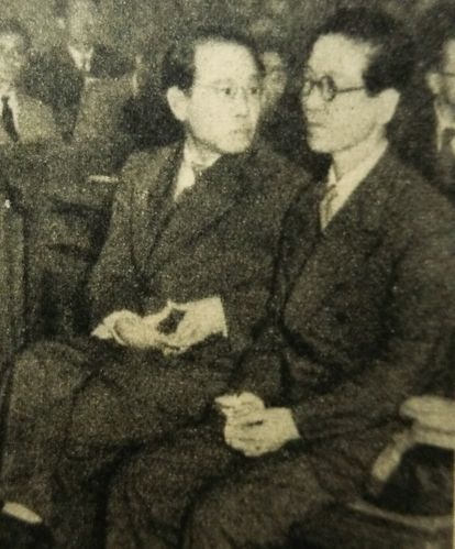 伊藤整（右）と小山久二郎（左）。チャタレー裁判にて。